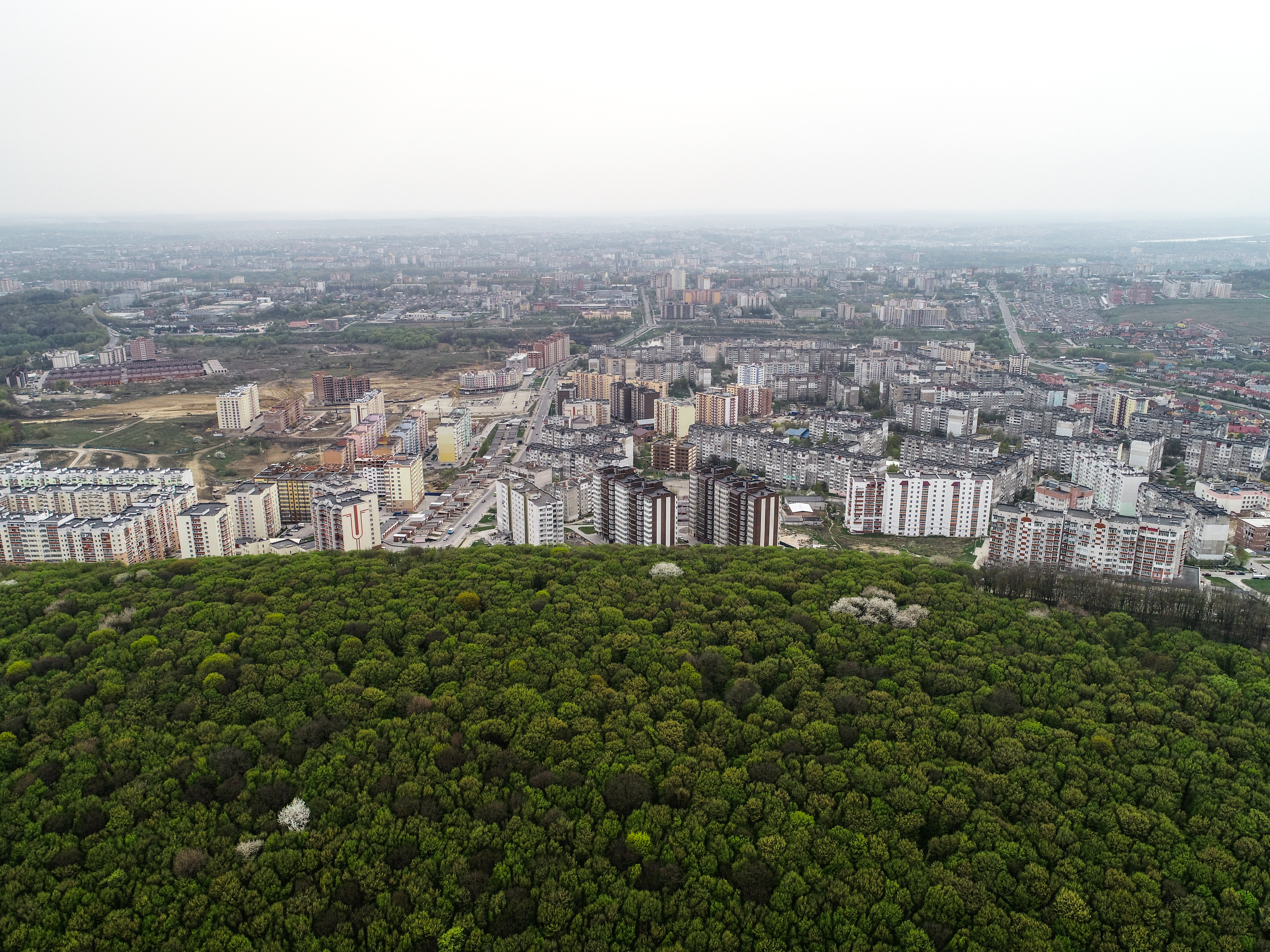 Лісогринівецький, Хмельницький район, Хмельницьке л-во, кв. 35, 36, ДП «Хмельницьке лісомисливське господарство»